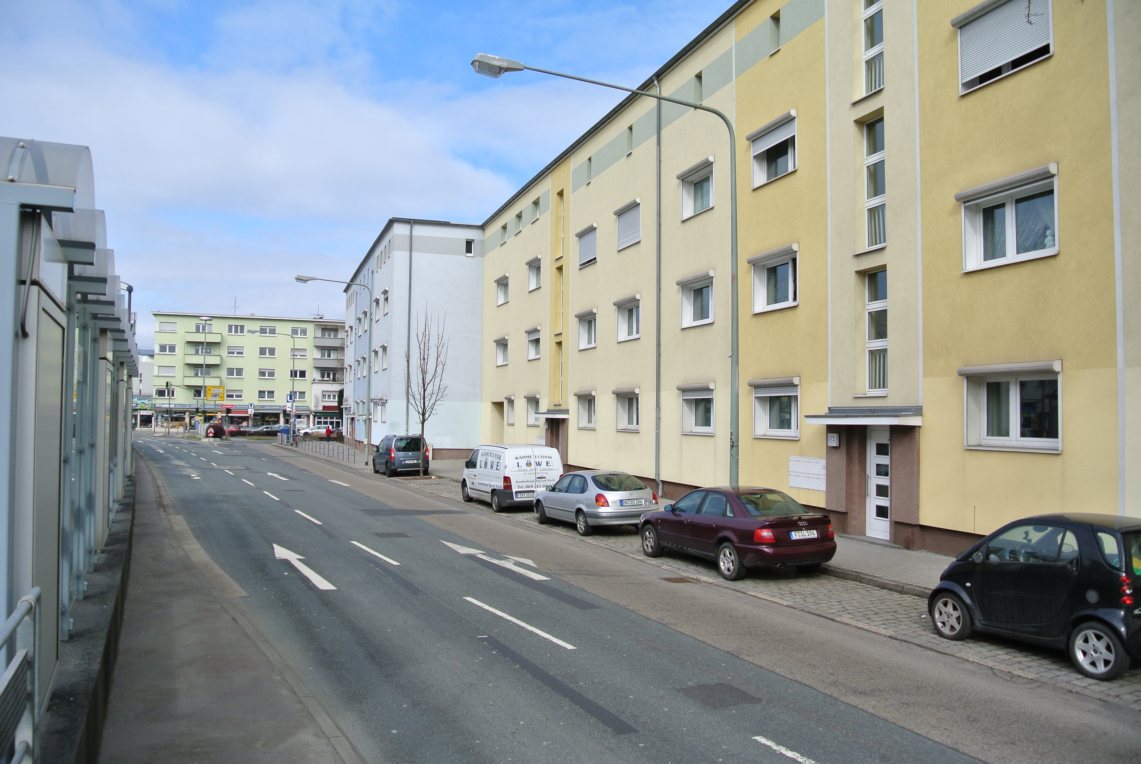 Blick nach Norden in Richtung Hügelstraße